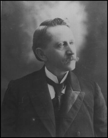 Image taken from [1]